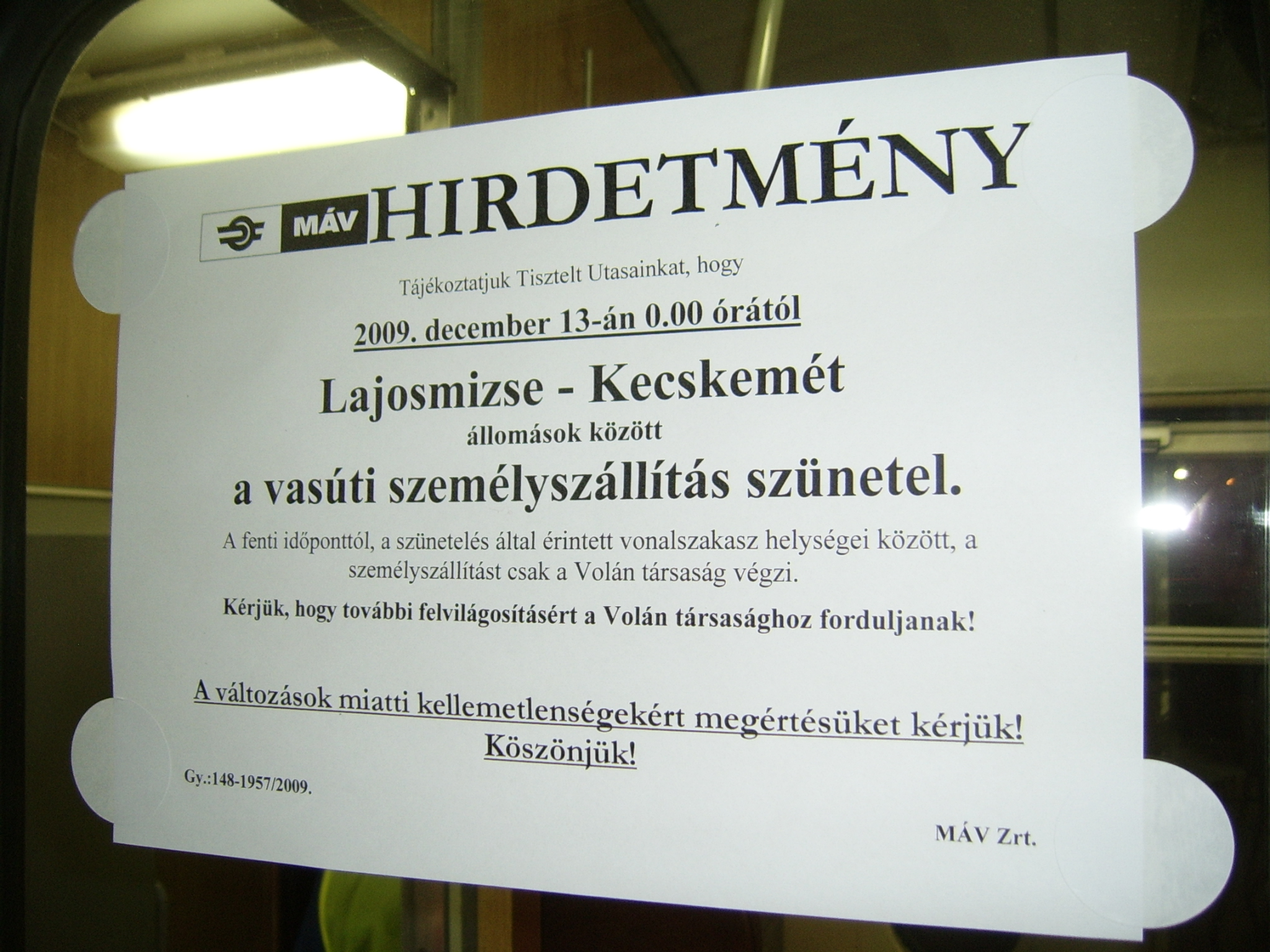 A 142-es vasútvonal Lajoszmizse-Kecskemét szakaszának bezárási hirdetménye a vonat belterében